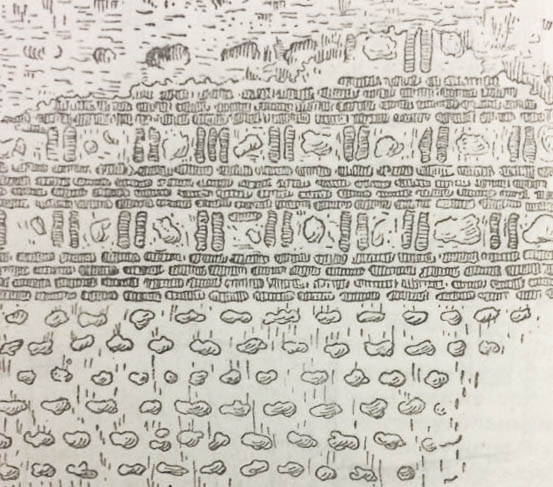 Qədim Gəncə qalasının ikinci divarında Gəncə hörgüsü